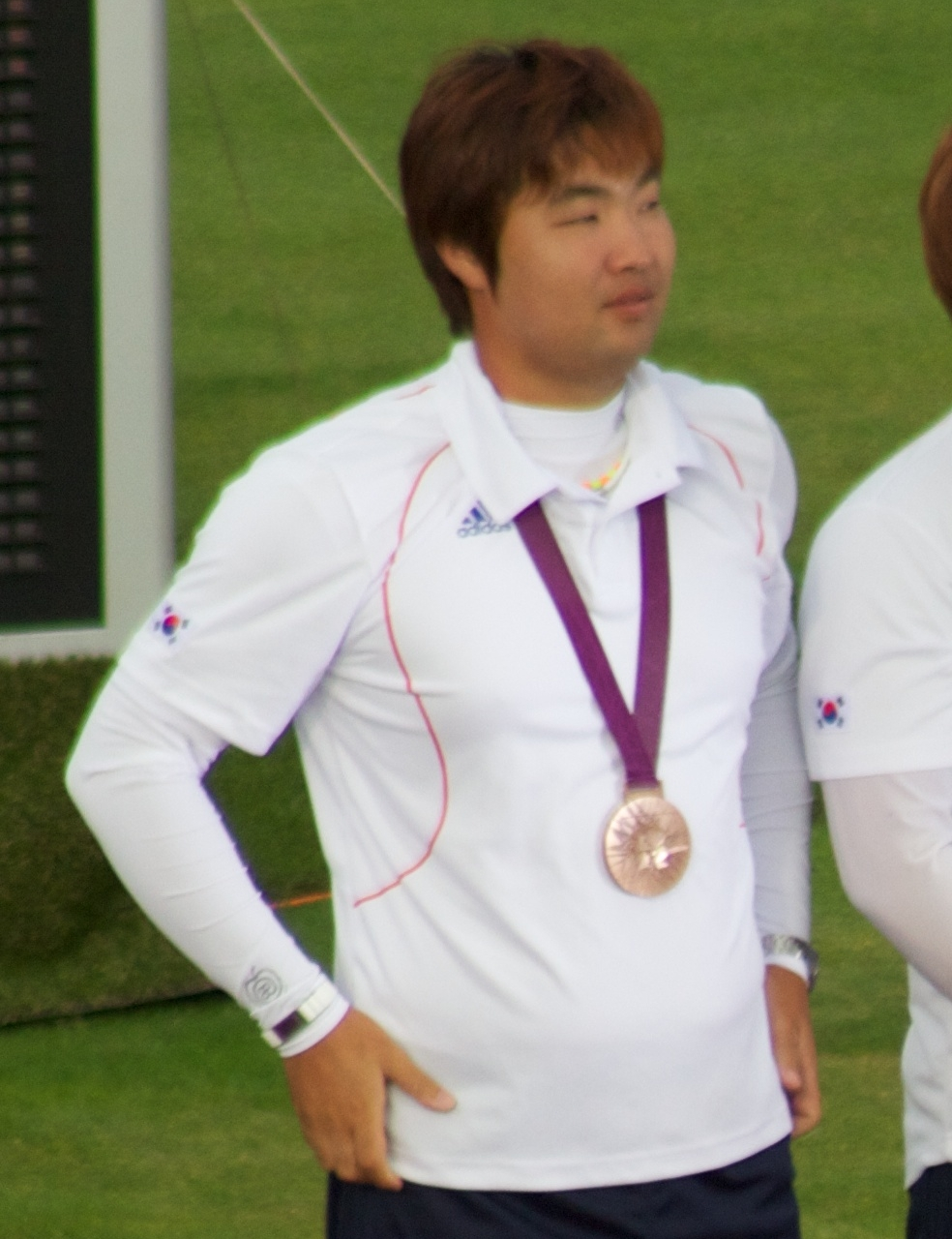 Im Dong-Hyun, con la medalla de bronce del evento por equipos masculino de tiro con arco en los Juegos Olímpicos de 2012